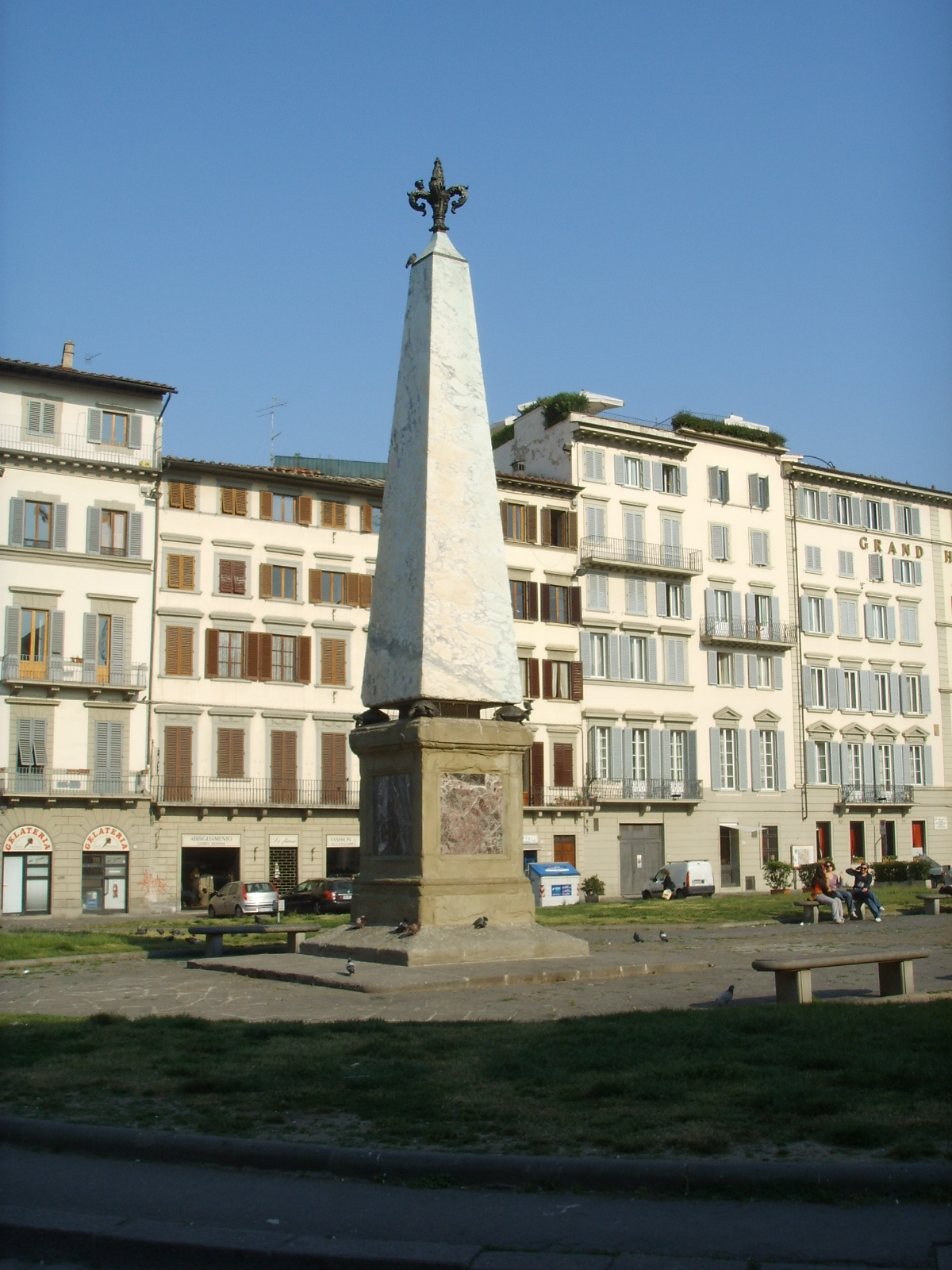 Obelisco piazza santa maria novella